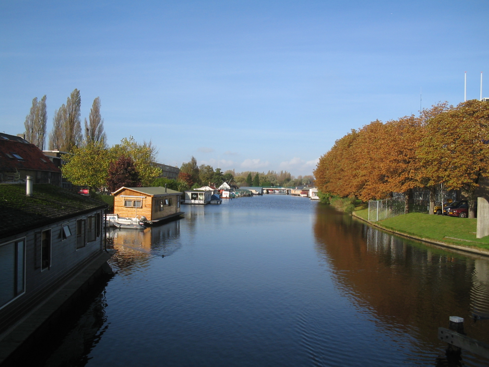 Vlaardingervaart, Netherlands (26 okt 2005)